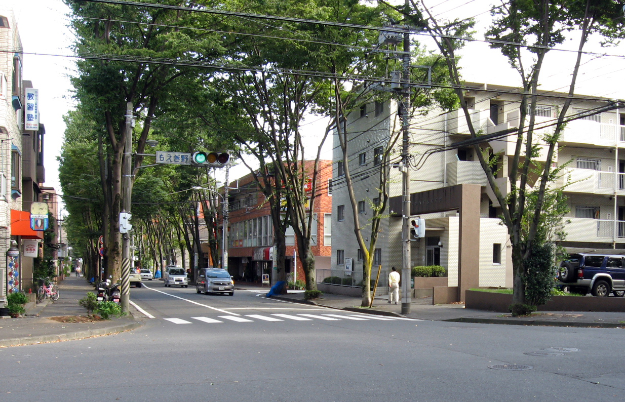 もえぎ野交差点。神奈川県横浜市青葉区。